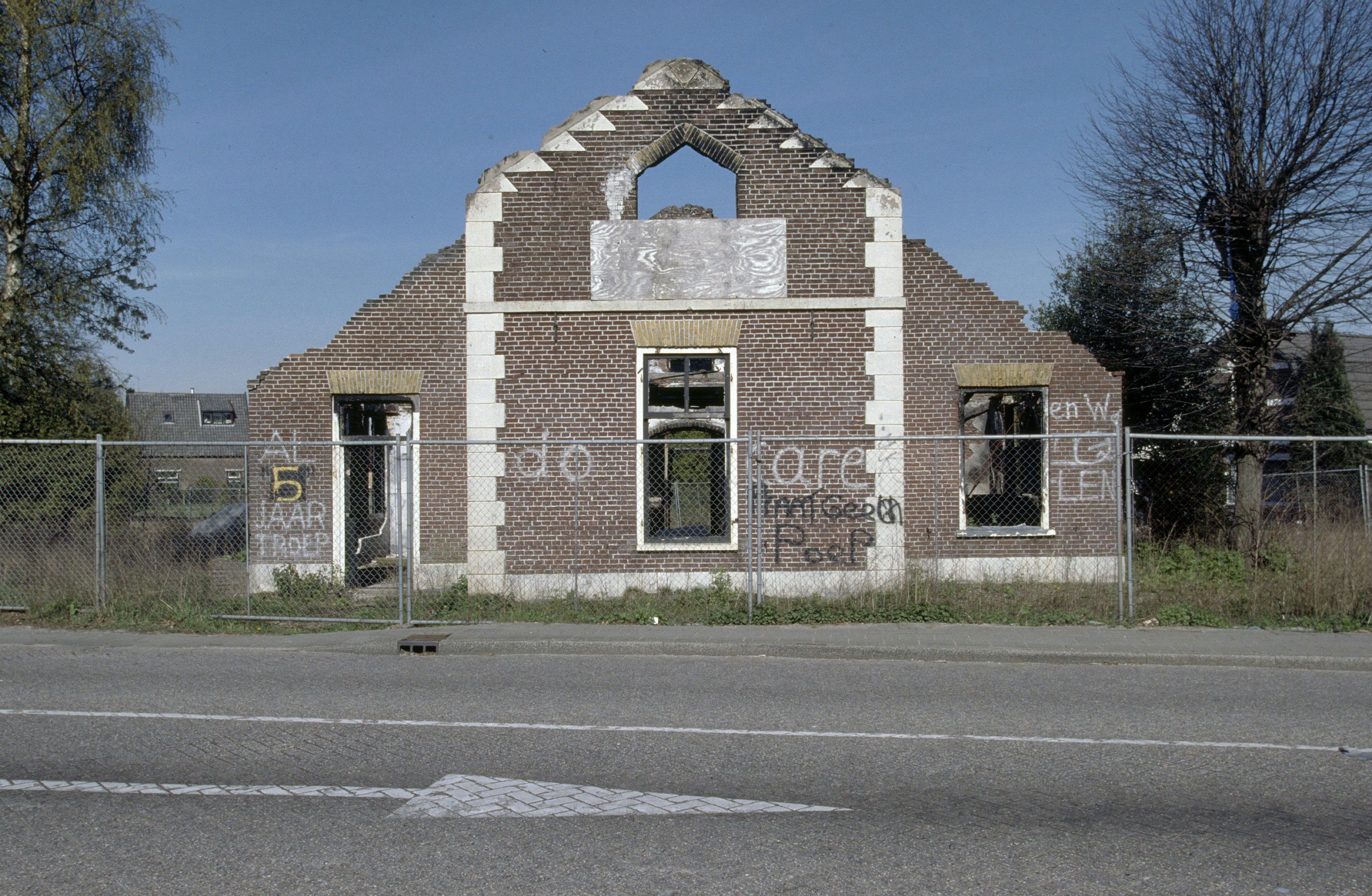 Brugwachterswoning: Het afgebrande brugwachtershuisje ter hoogte van de Welgelegenbrug bij het Apeldoorns Kanaal